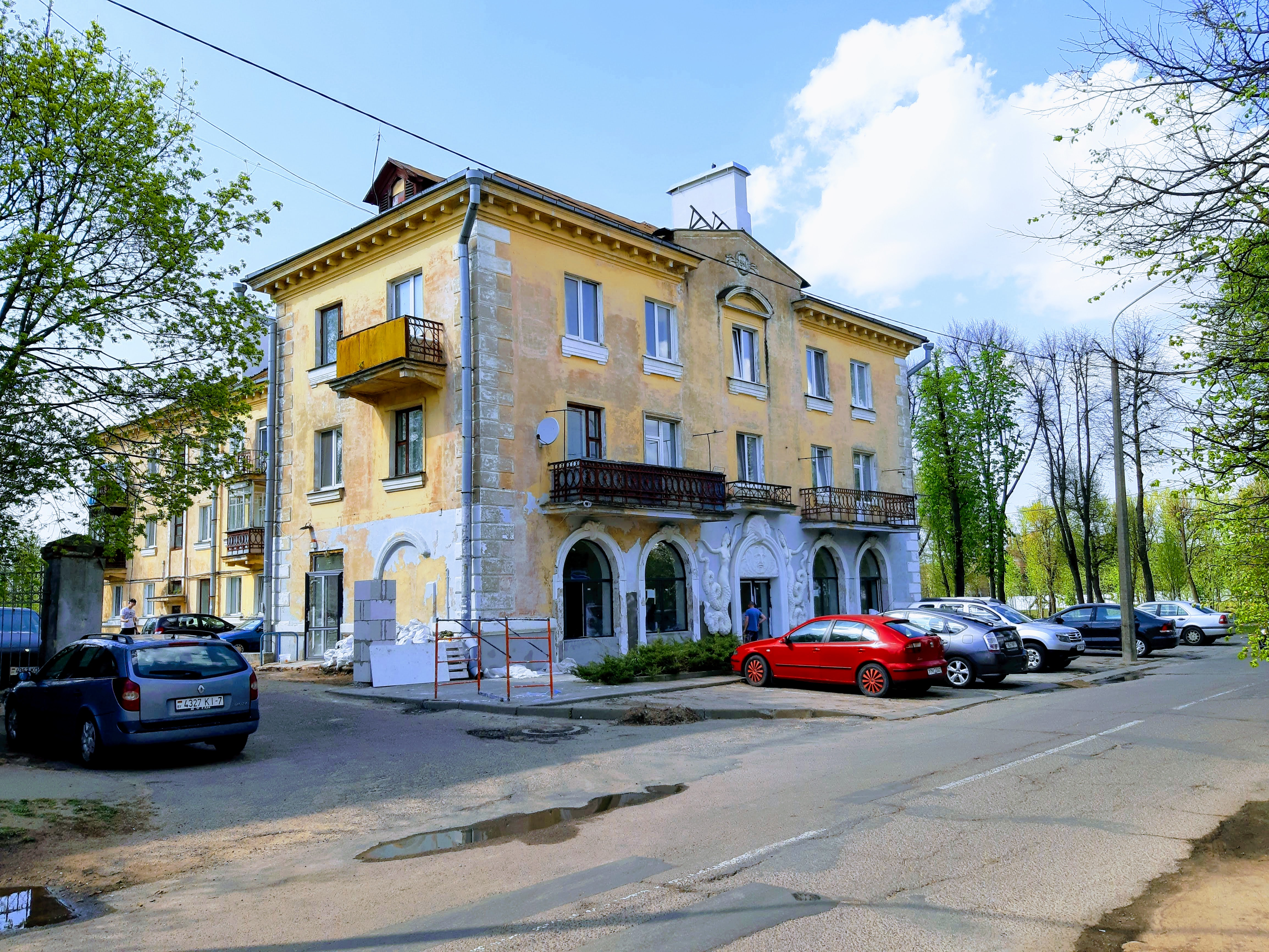 Мінск. Трактаразаводскі пасёлак